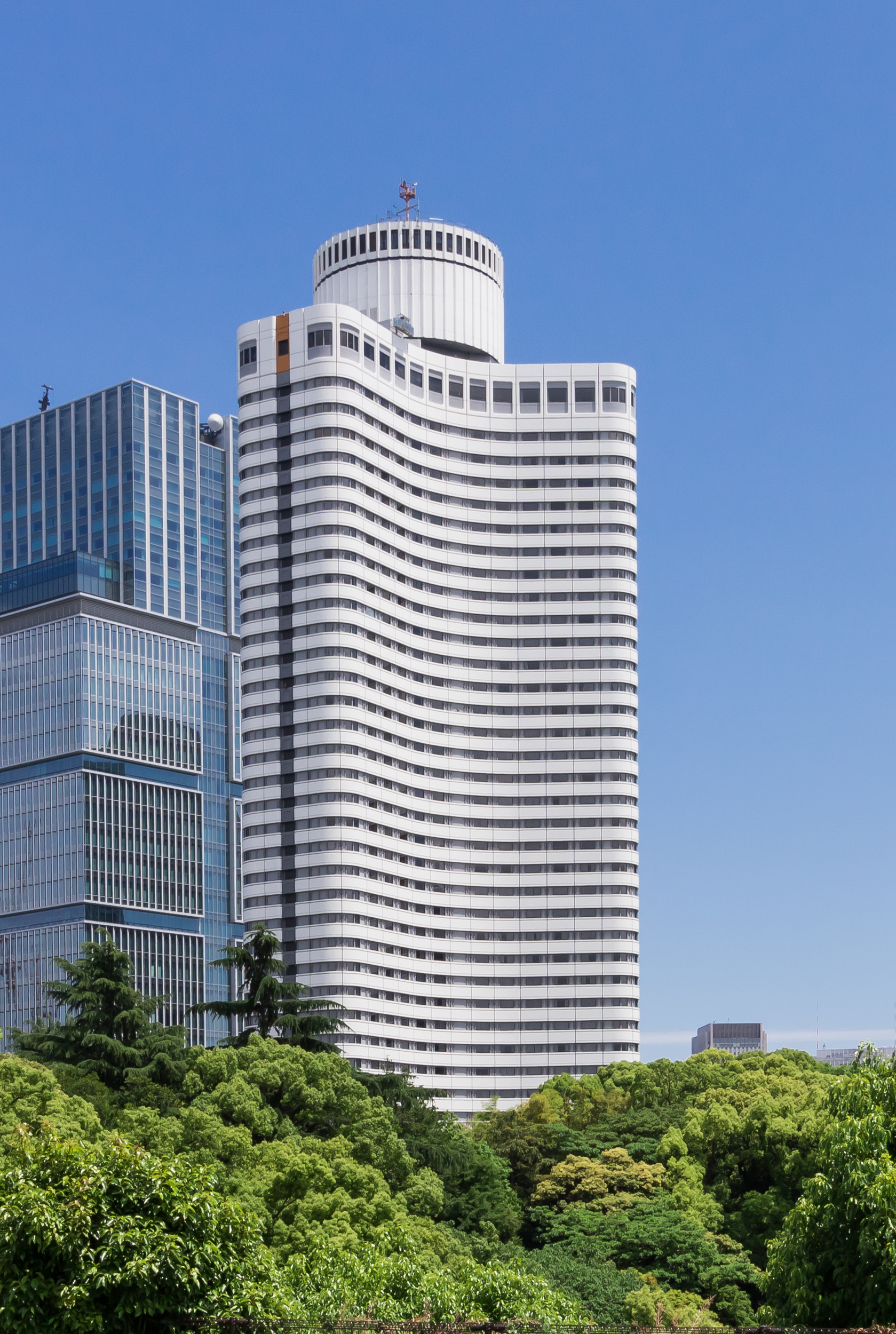 ホテルニューオータニ, ガーデンタワー